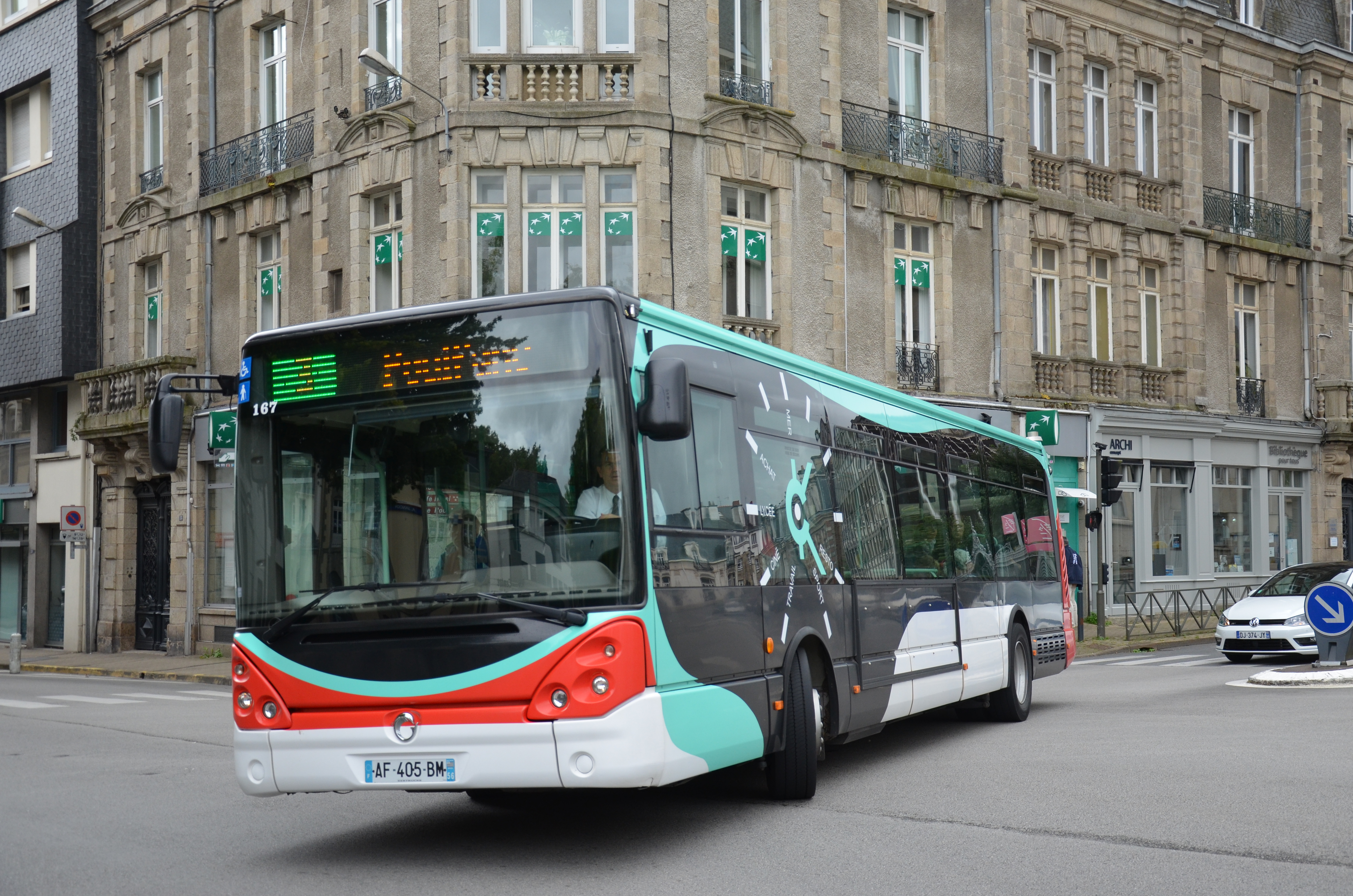 Irisbus Citelis 12 n°167 en approche de l'arrêt République, sur le réseau Kicéo de Vannes.